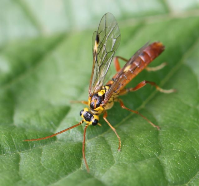 Tenthredopsis litterata, Männchen, am 29. Mai 2019 in Walldorf/Baden